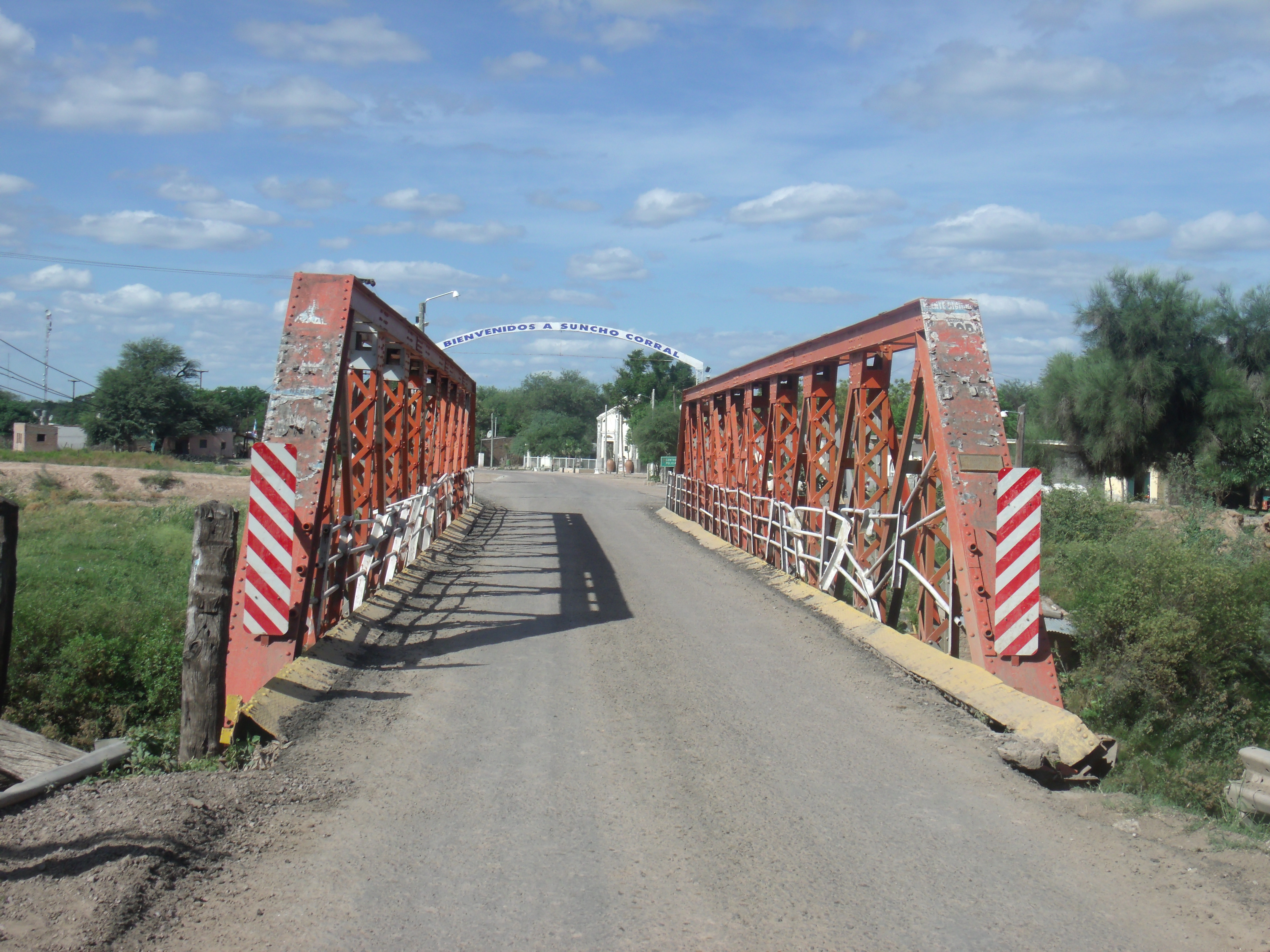 Puente de la Ruta Nacional 89 sobre el río Salado en Suncho Corral, visto desde la margen derecha del río.